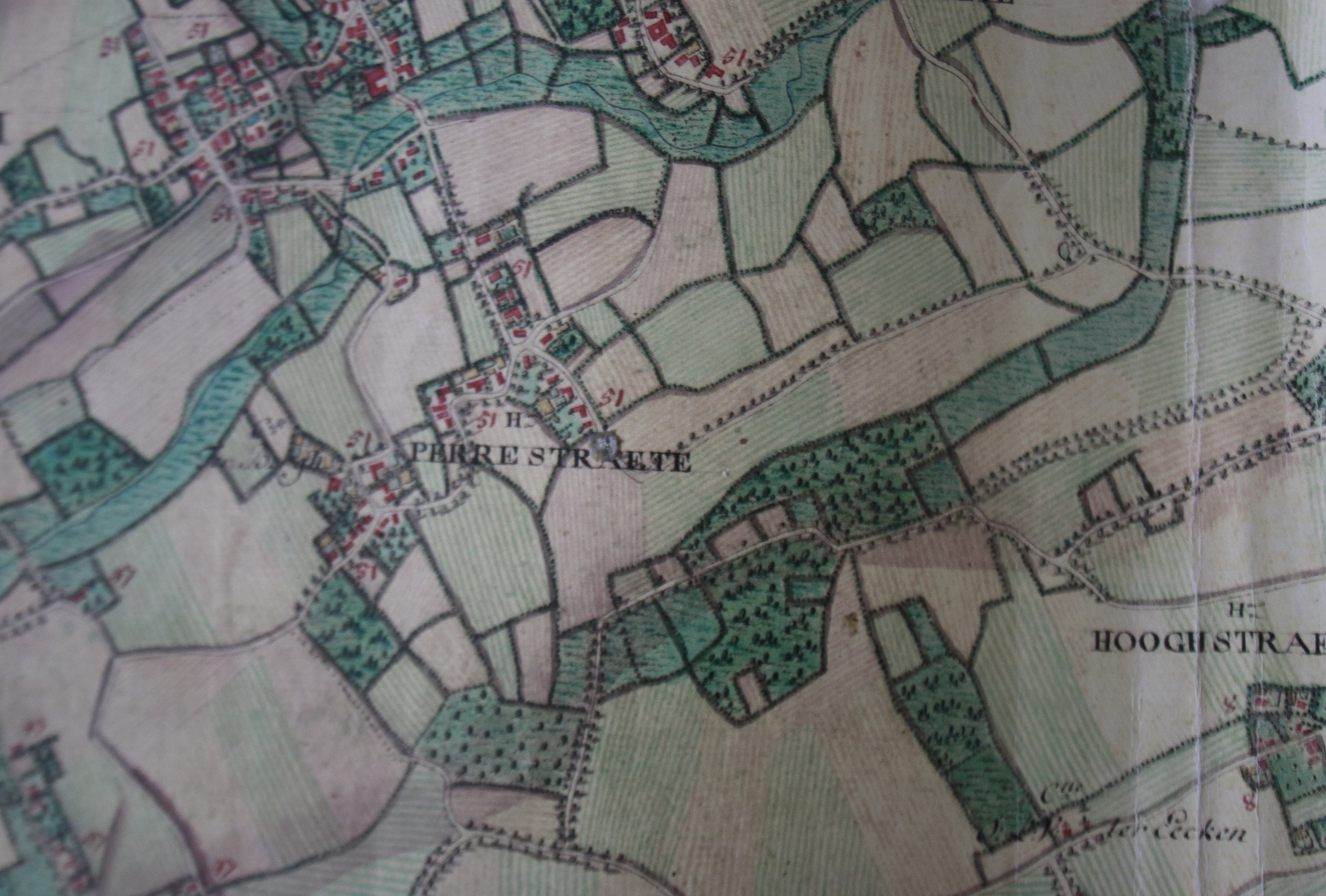 Doormansbos, Ferraris